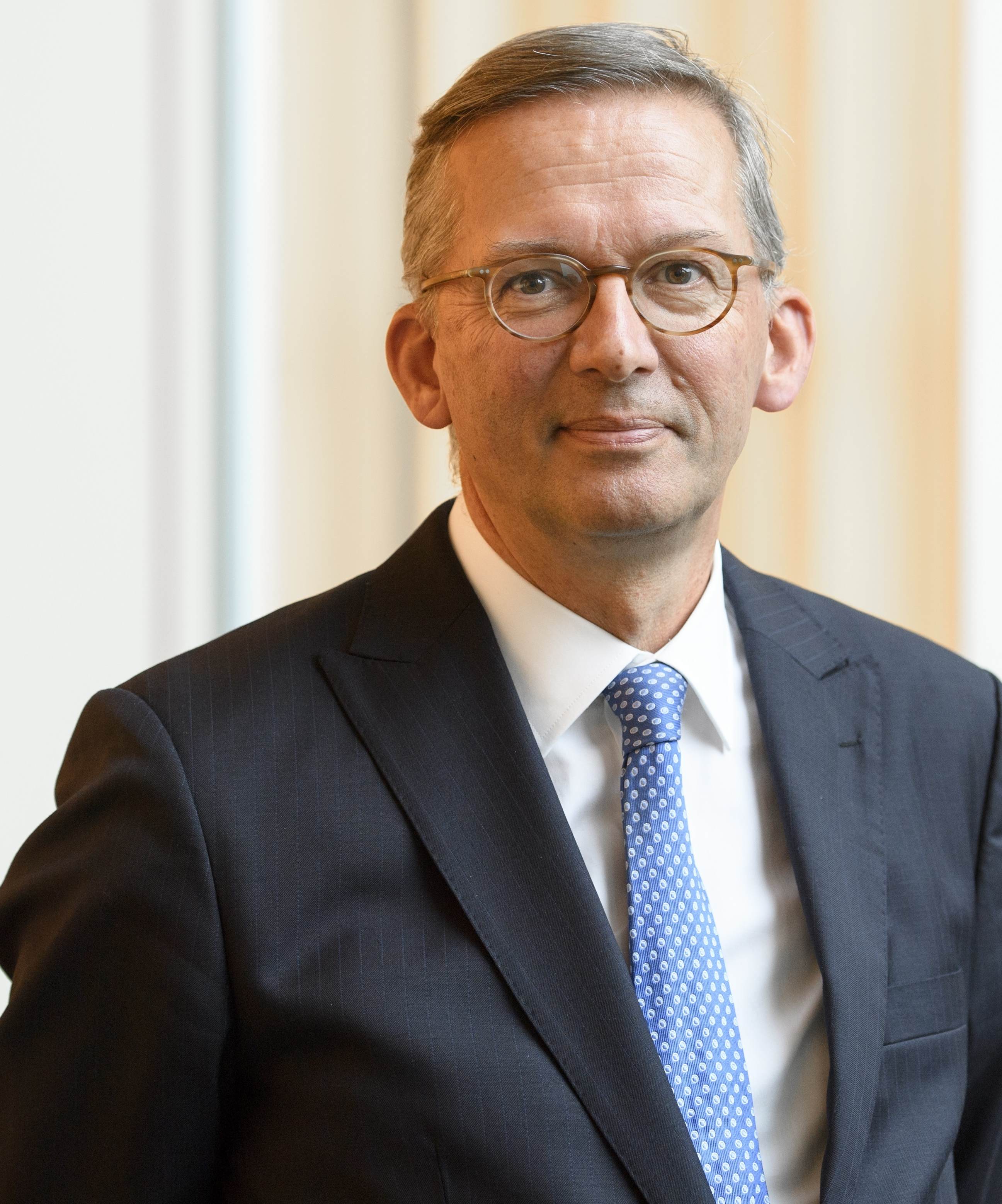 Eric Janse de Jonge